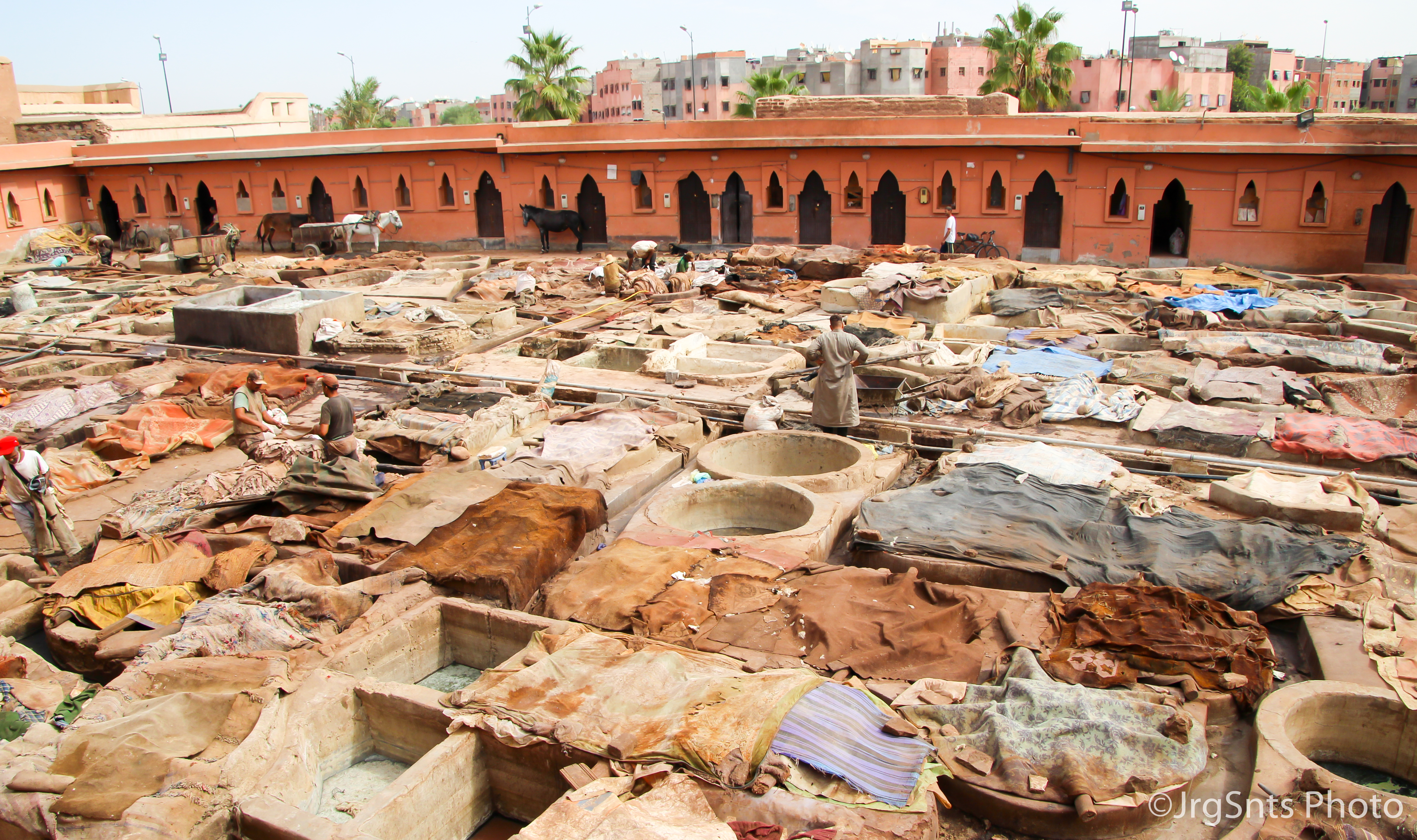 "La Tannerie" de Marraquexe, o lugar onde são tratadas as peles e fibras vegetais. Em média, o processo de tratamento de uma pele dura cerca de 40 dias.